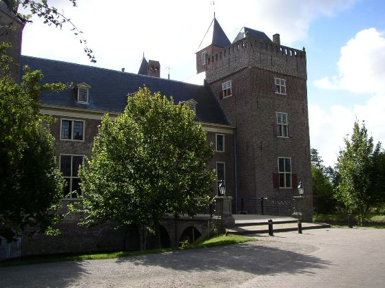 Heemskerk, the Netherlands